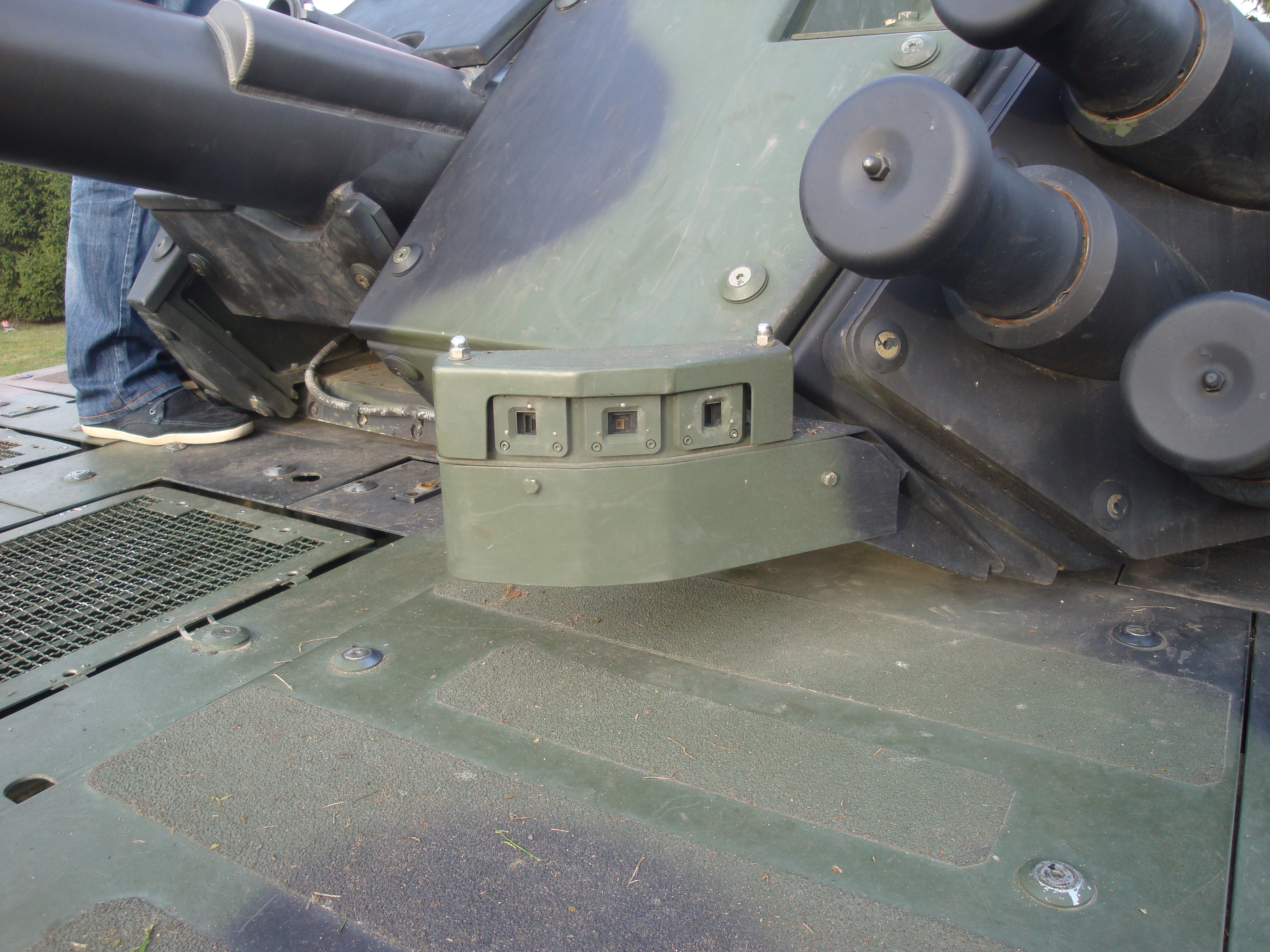 Kołowy Transporter Opancerzony Rosomak. Czujniki opromieniowania laserem i wyrzutnie granatów dymnych na wieżyczce.